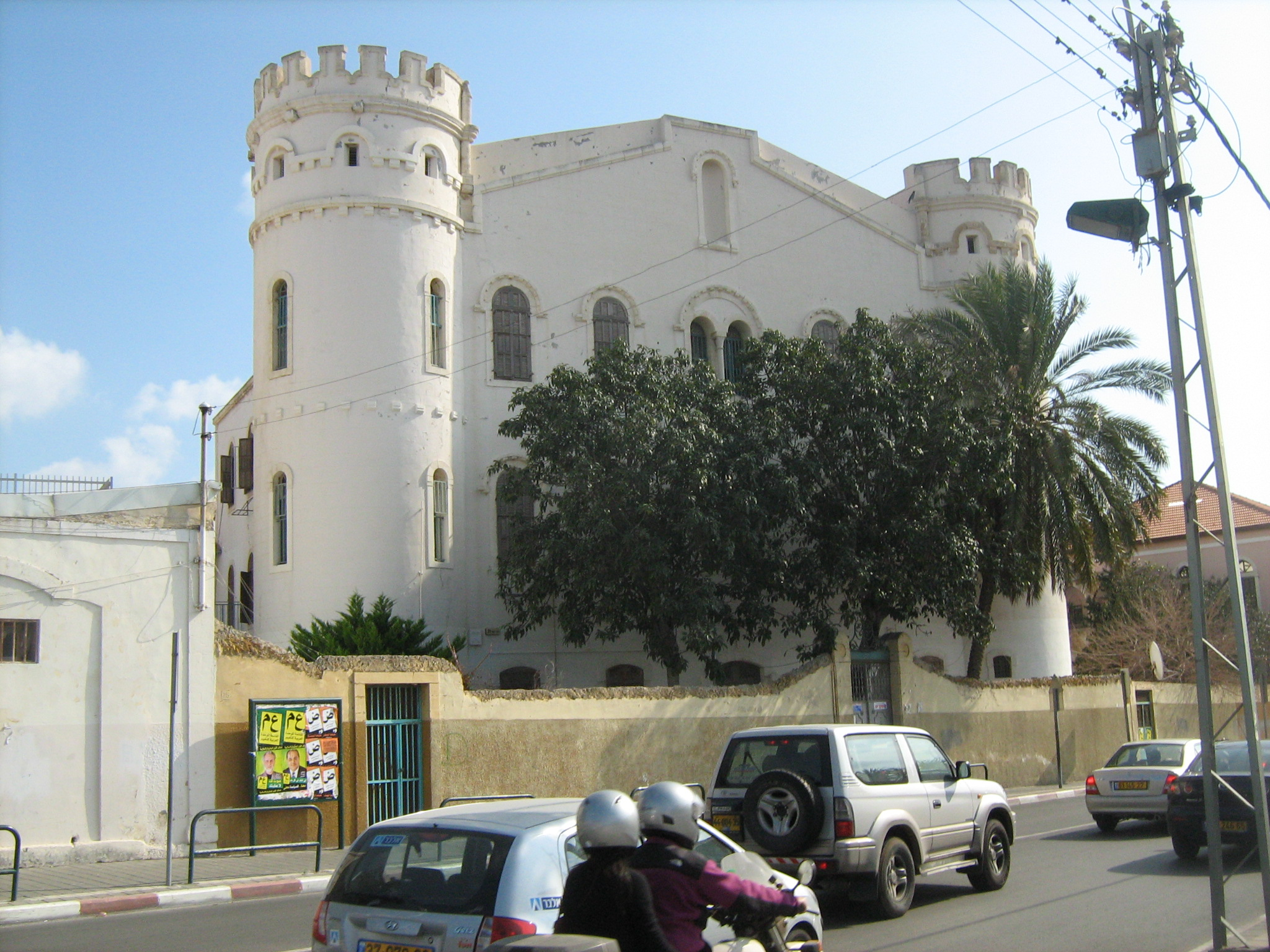 רח' יפת